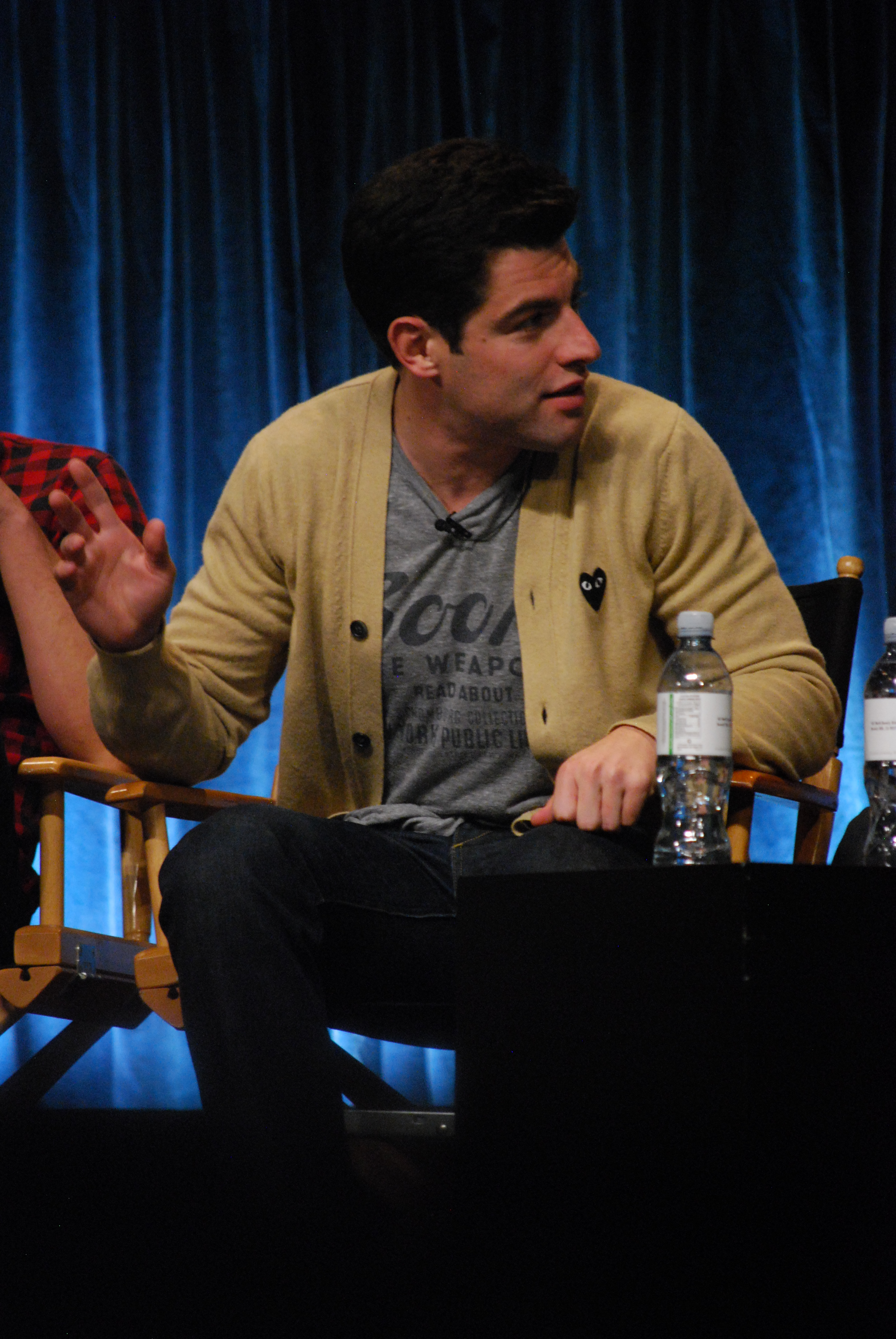 Max Greenfield